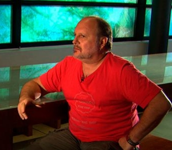 O dramaturgo argentino Daniel Veronese na TV Brasil